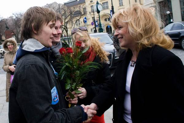 Hráme za Ivetu, 18. marec 2009, Hviezdoslavovo námestie v Bratislave, s prvovoličmi